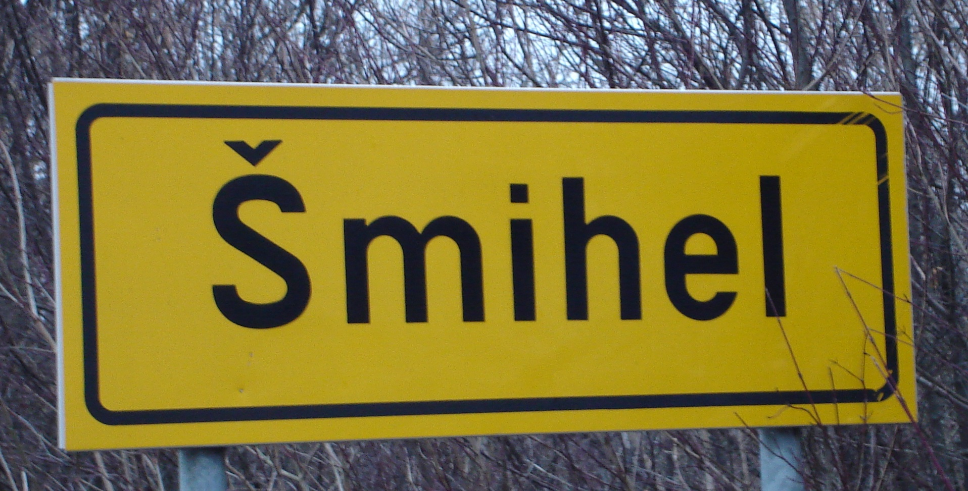 Šmihel